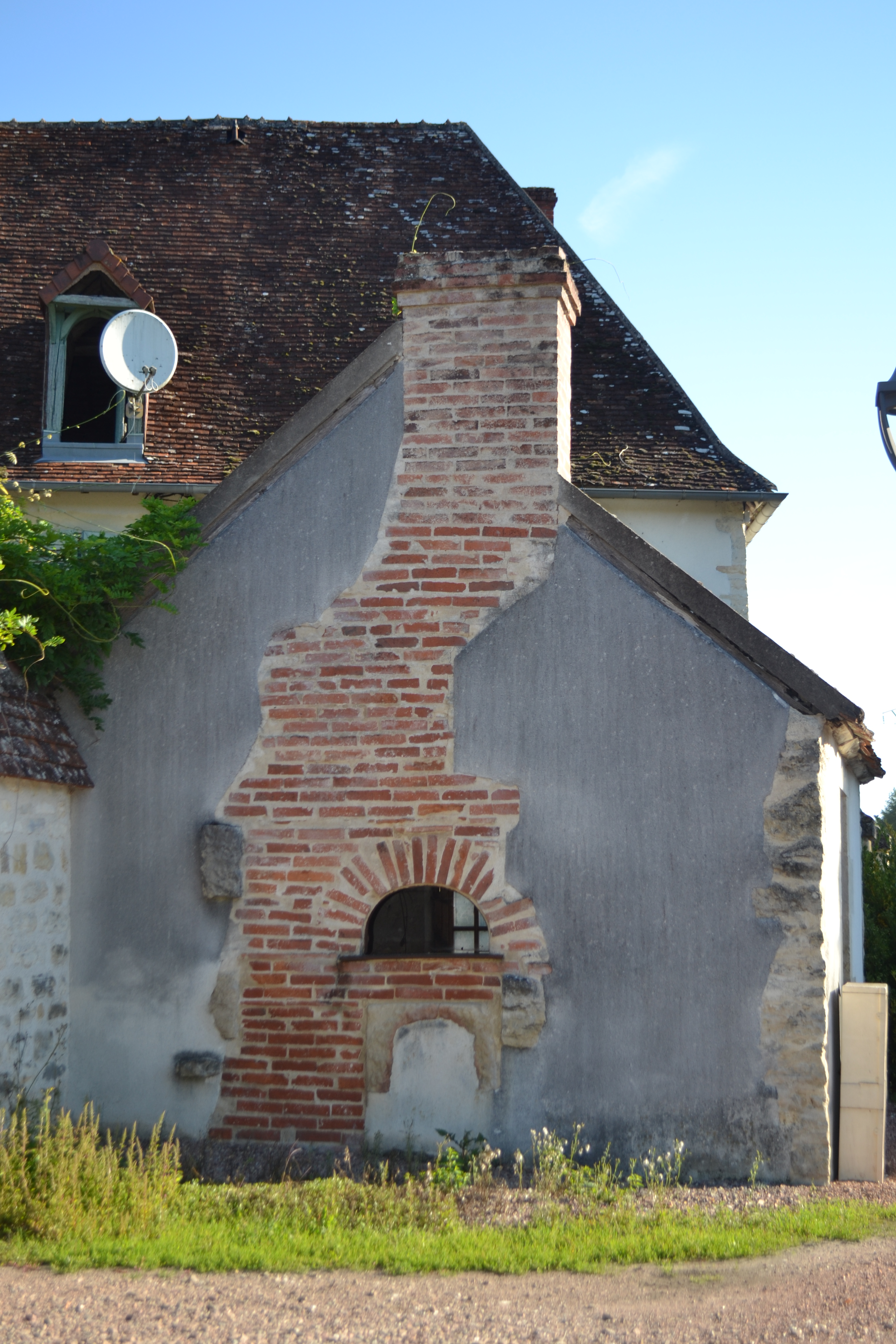 Four à pain à usage collectif, XIXe siècle, Murlin, Nièvre.